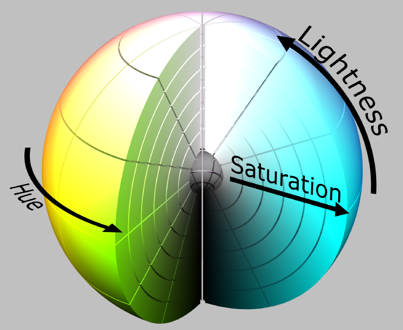 Die Farbkugel zeigt kontinuierlich ineinander übergehende Farbtöne. Sie ist auf geschnitten und zeigt die drei Farbmerkmale Farbton (Hue), Sättigung (Saturation) und Helligkeit (Lightness).